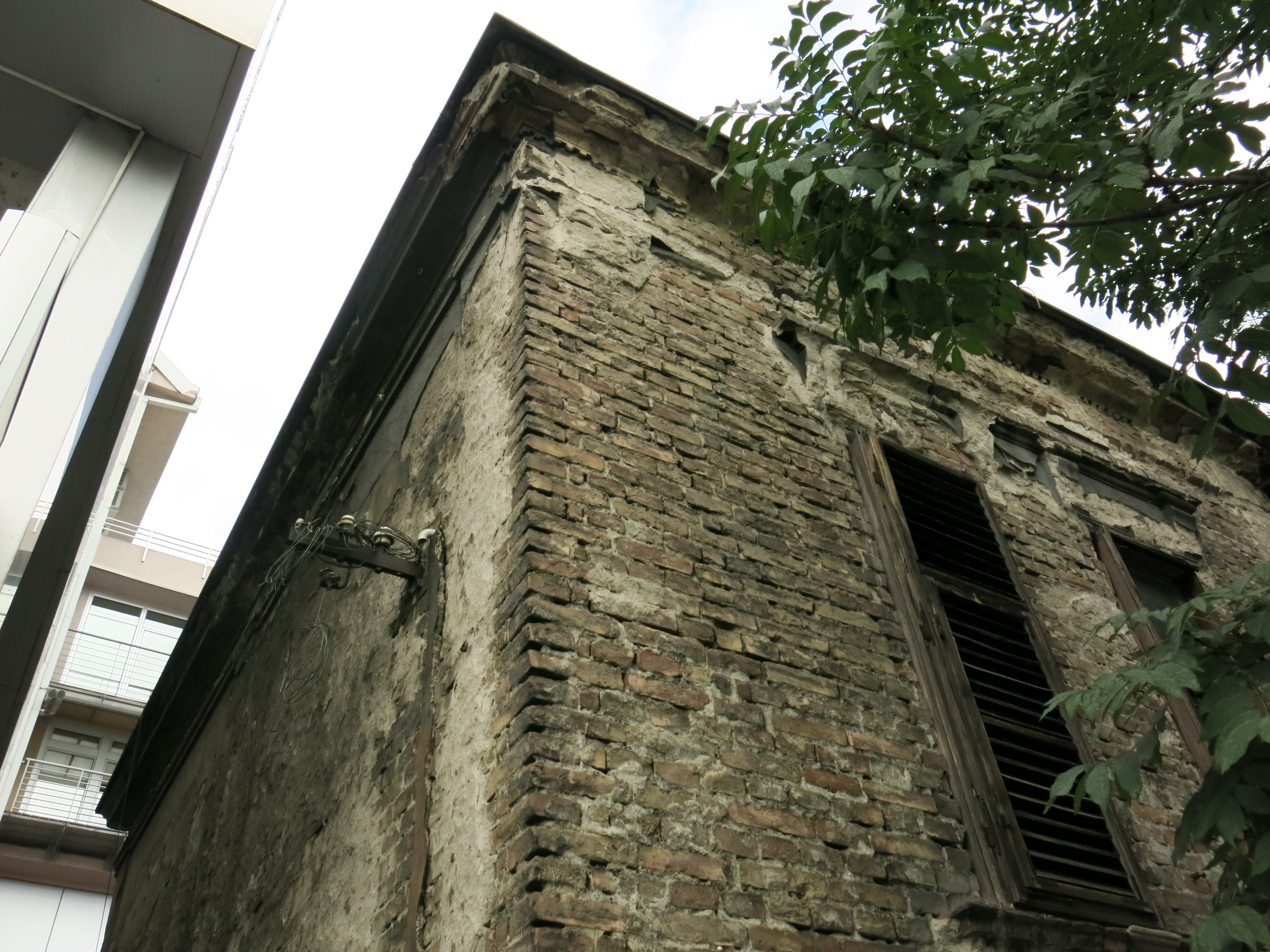 Кућа Филипа Филиповића